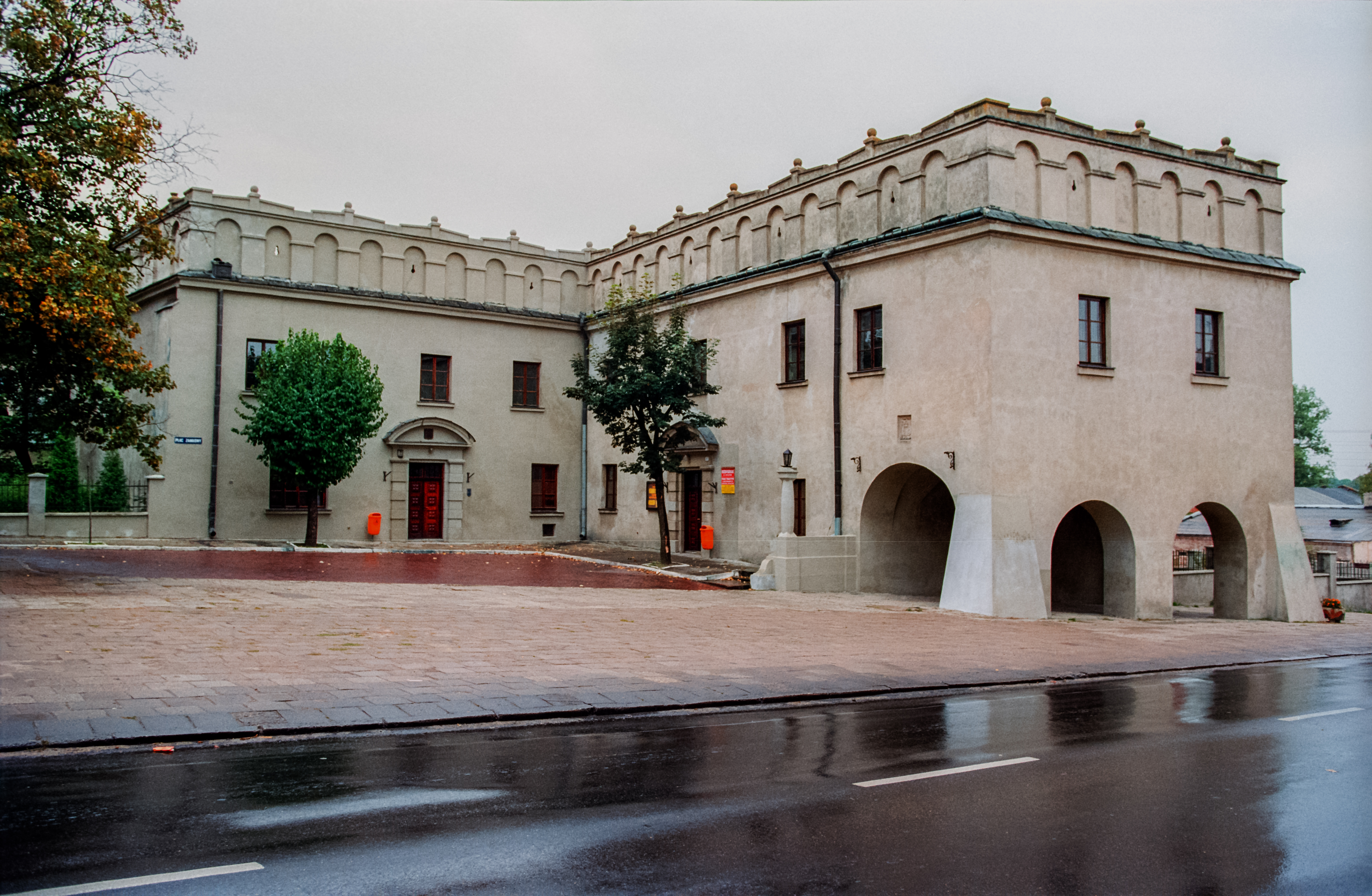 Opoczno castle, Poland